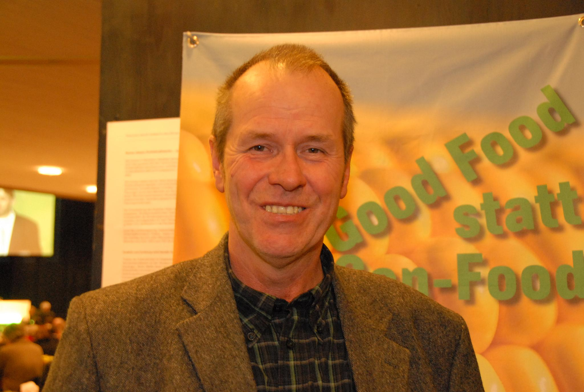 Friedrich Ostendorf, Listenplatz 14